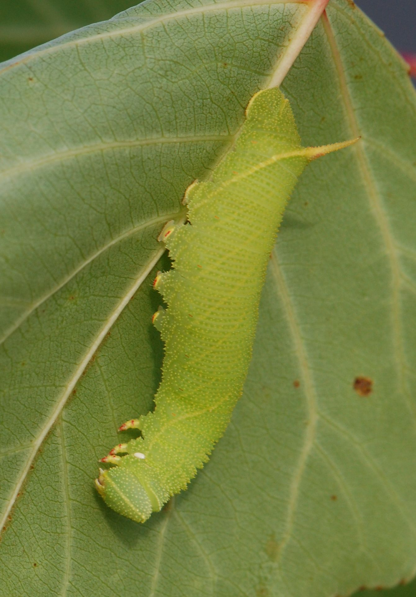 Laothoe populi (Sphingidae), Raupe auf Pappel